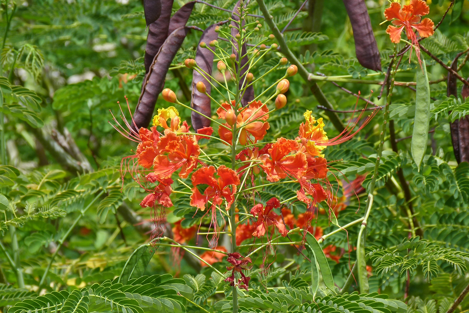 Nationalblume von Barbados: "Red Pride of Barbados" (Peacock Flower, Caesalpinia pulcherrima) in einem Garten in Bridgetown